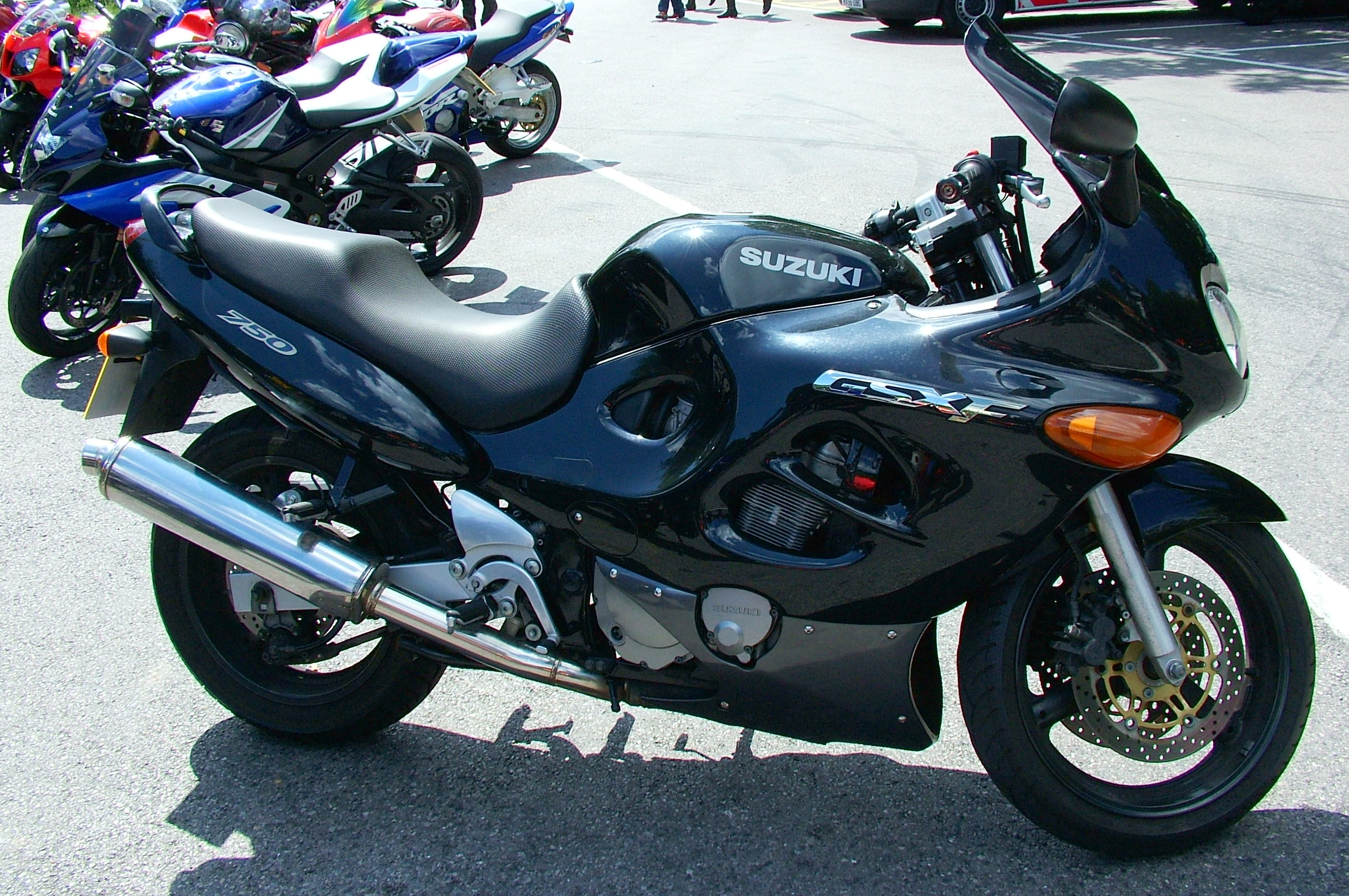 Suzuki GSX750F